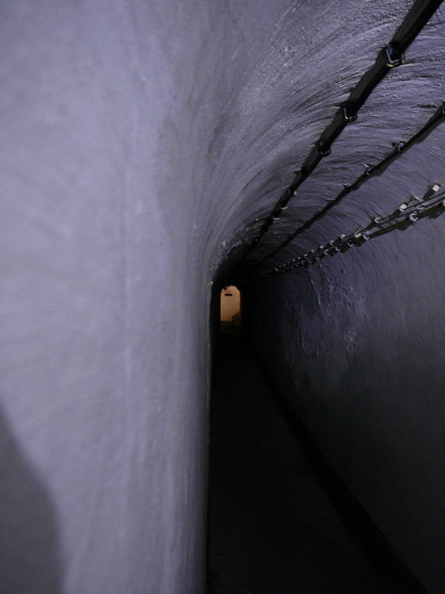 tunnel dell'opera 1 , prato drava